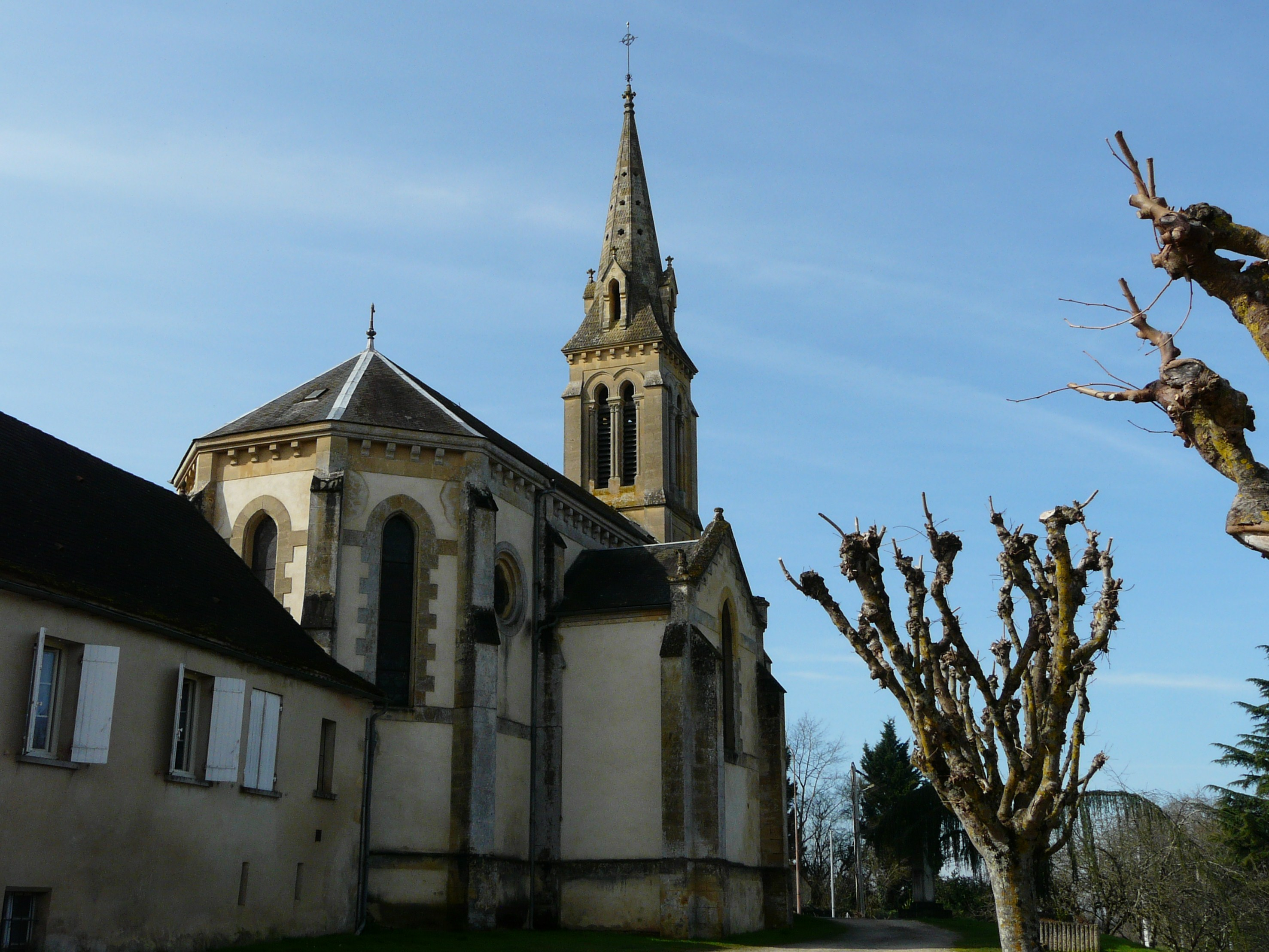 L'église Sainte-Marguerite, Saint-Germain-et-Mons, Dordogne, France.